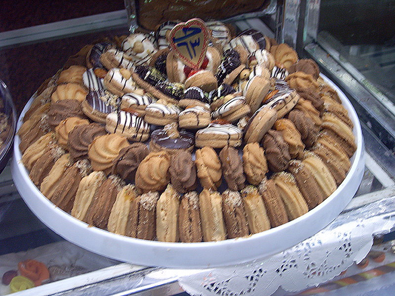 Verschiedene Sorten Kleingebäck